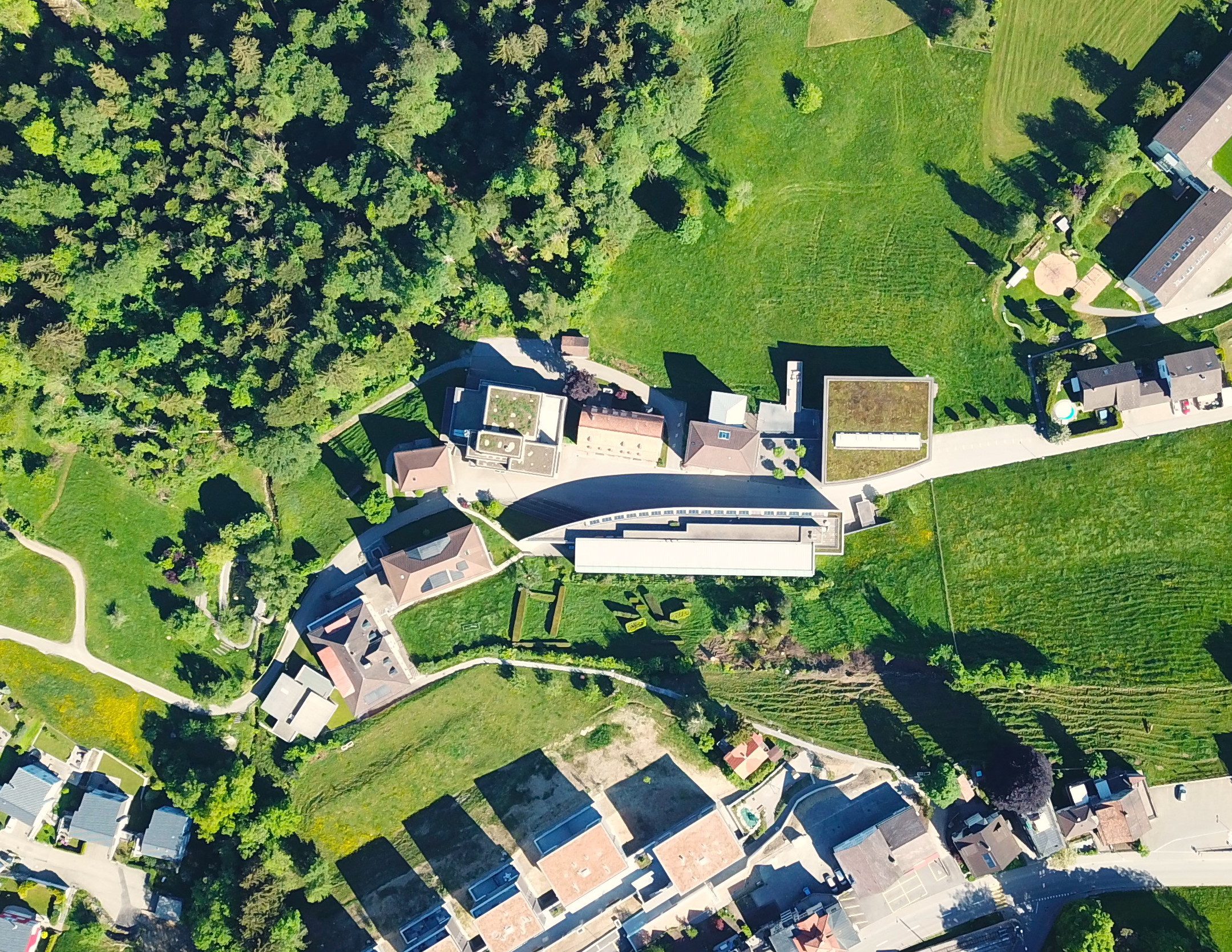 Vogelperspektive der Kantonsschule Trogen, um 10.02 Uhr